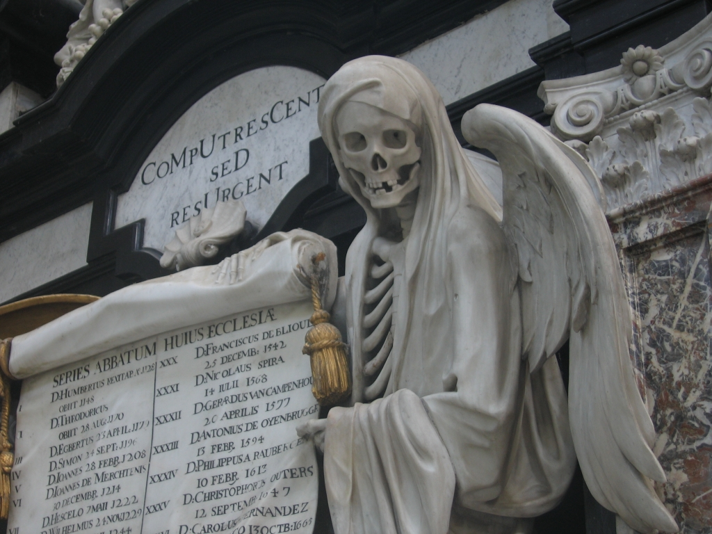 Verrijzenismonument abdijkerk Grimbergen